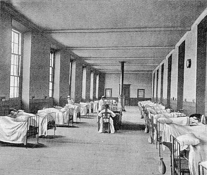 Un dortoir du grand hôpital maritime de Berck